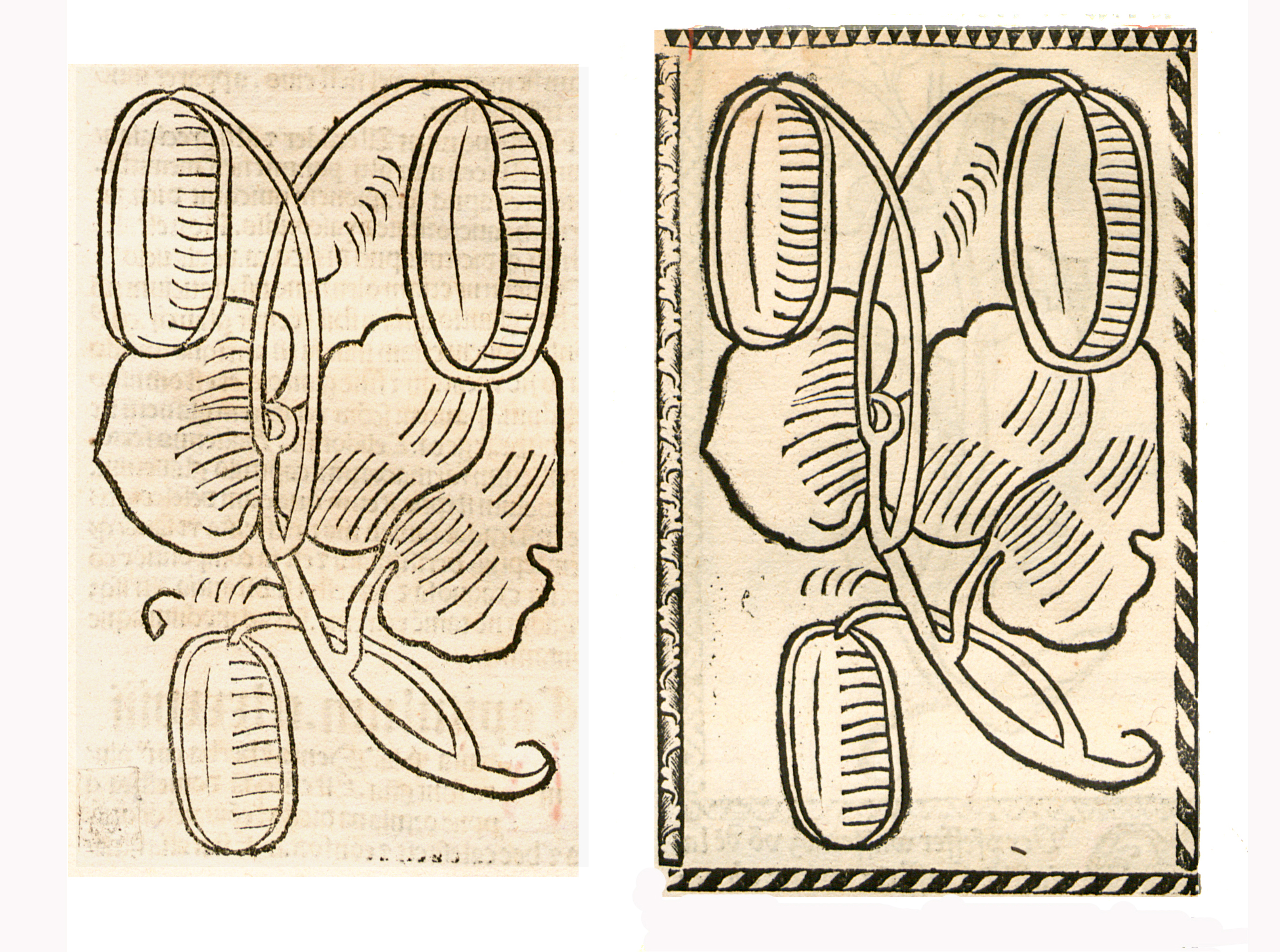 Abbildung von: Millunen (Cucumis melo)